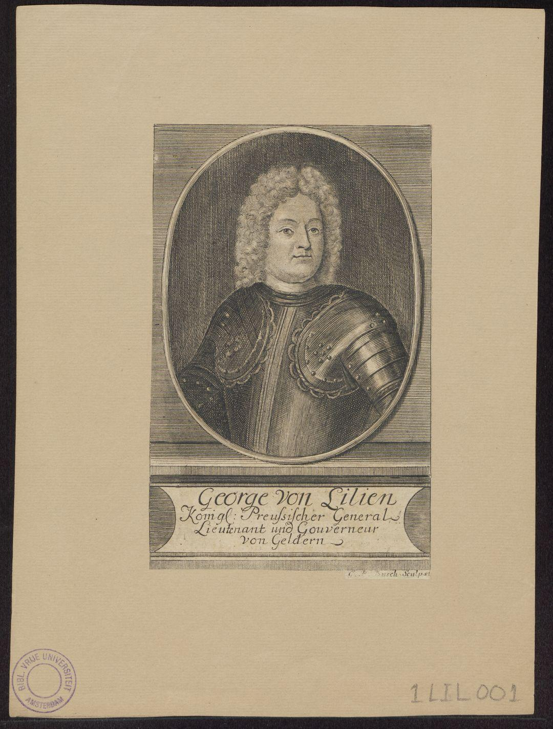 George von Lilien (1652-1726), preußischer Generalleutnant und Gouverneur von Geldern